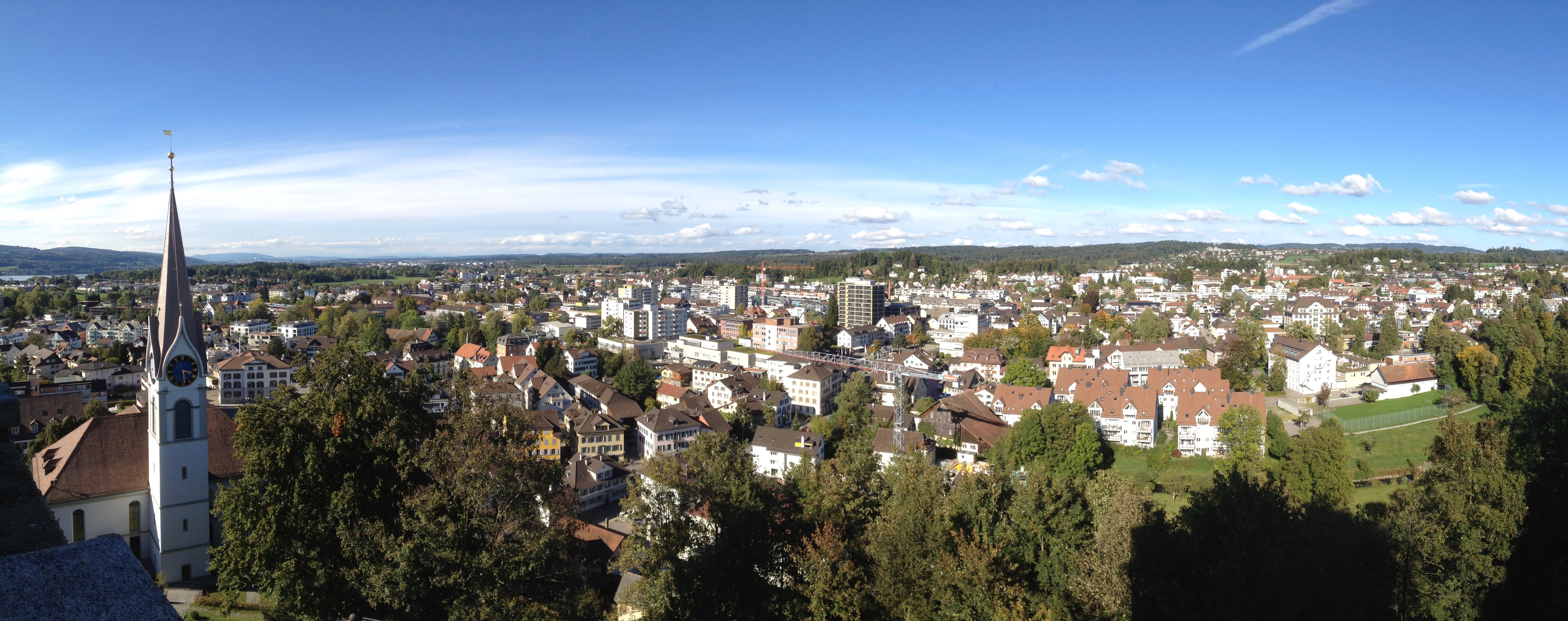 Panorama der Stadt Uster vom Schloss fotografiert